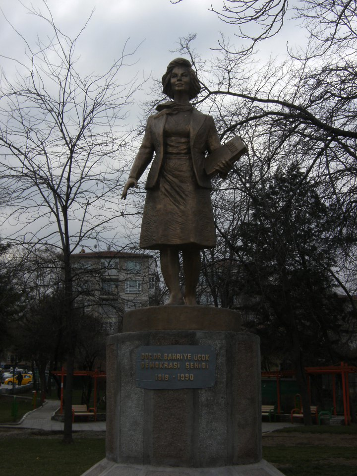 Bahriye Üçok heykeli , Bahçelievler , Ankara